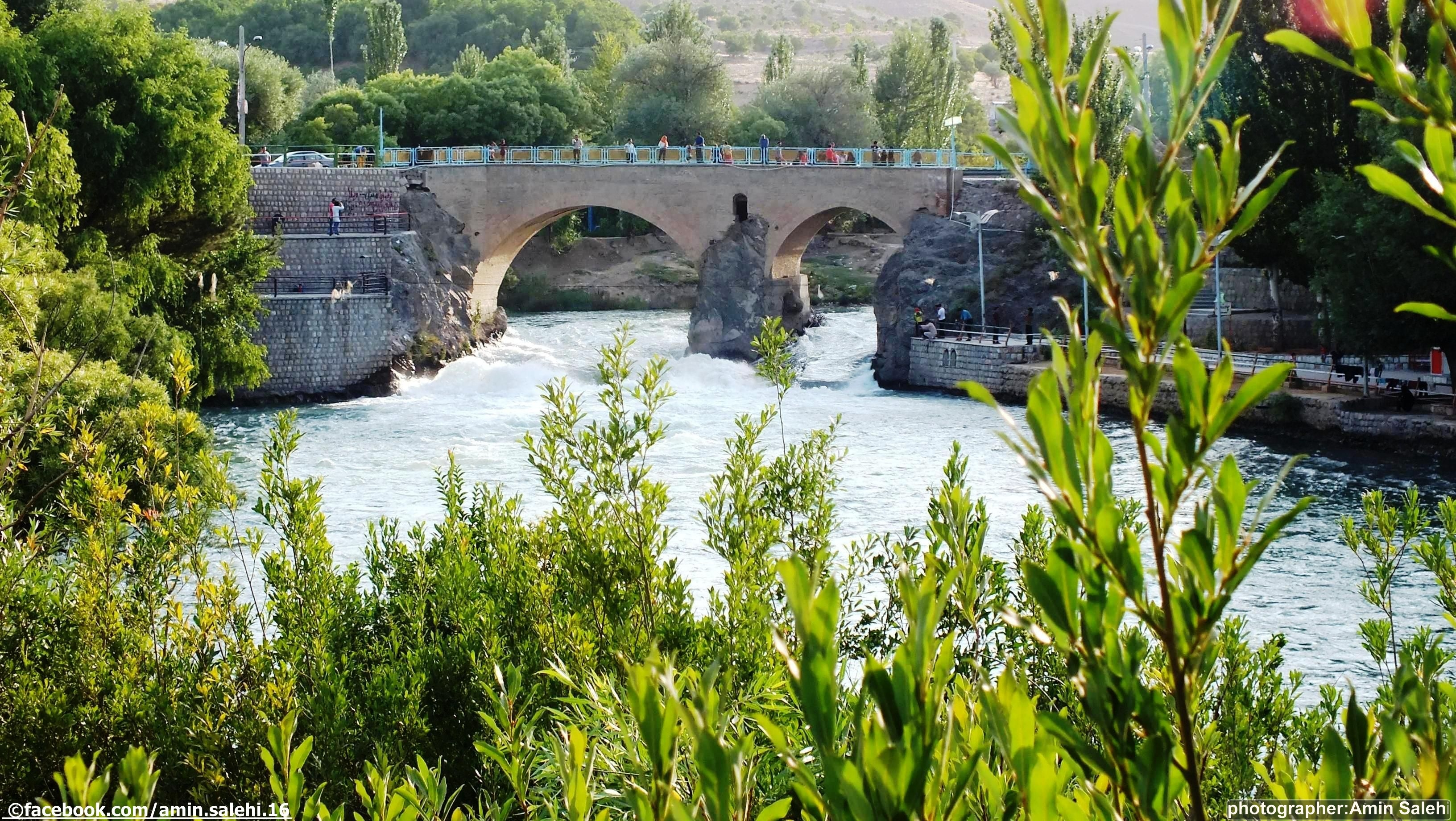 عکس از خود پل تابستان 1392